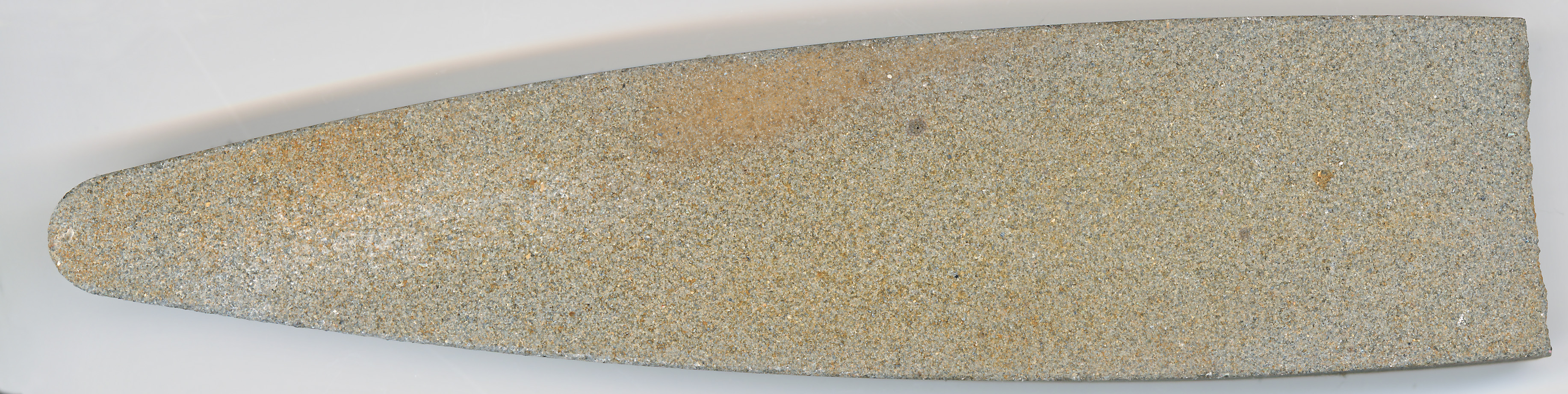 Whetstone